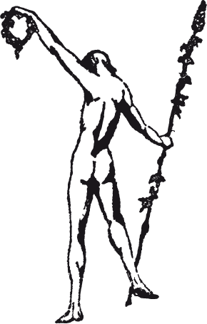 Logo del Premio Adonáis de Poesía